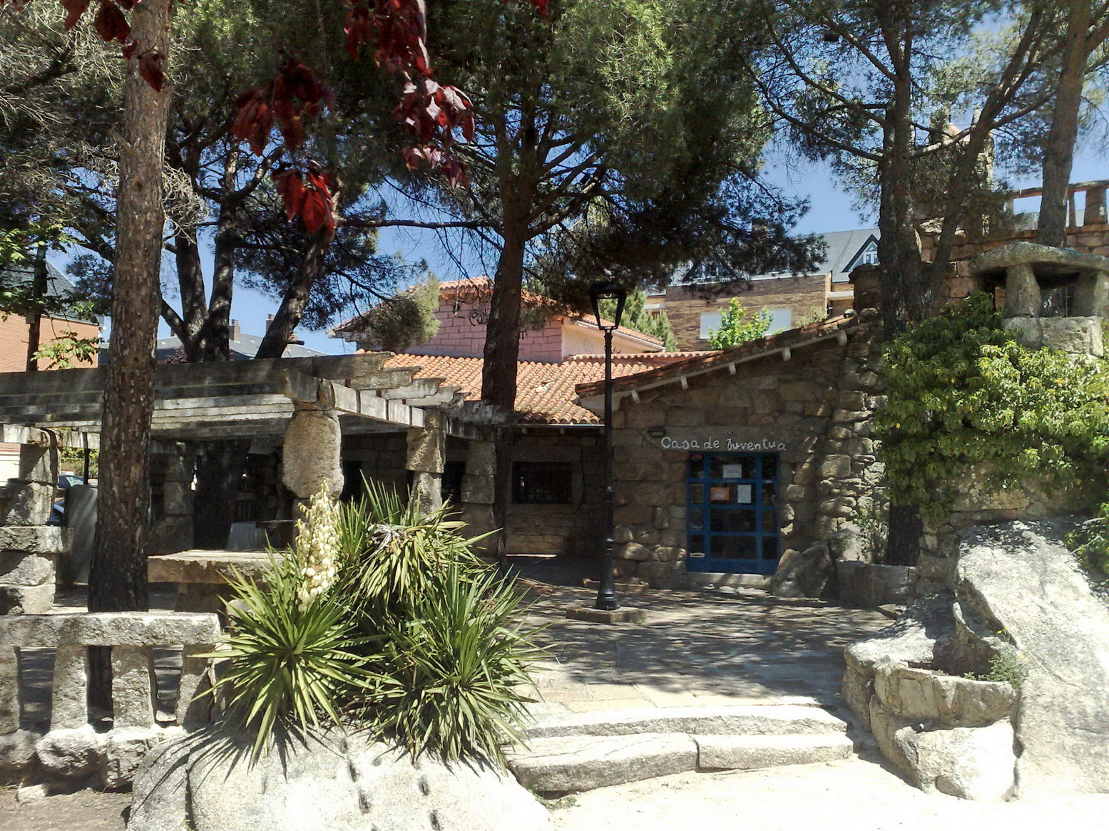 Torrelodones. Casa de la Juventud.